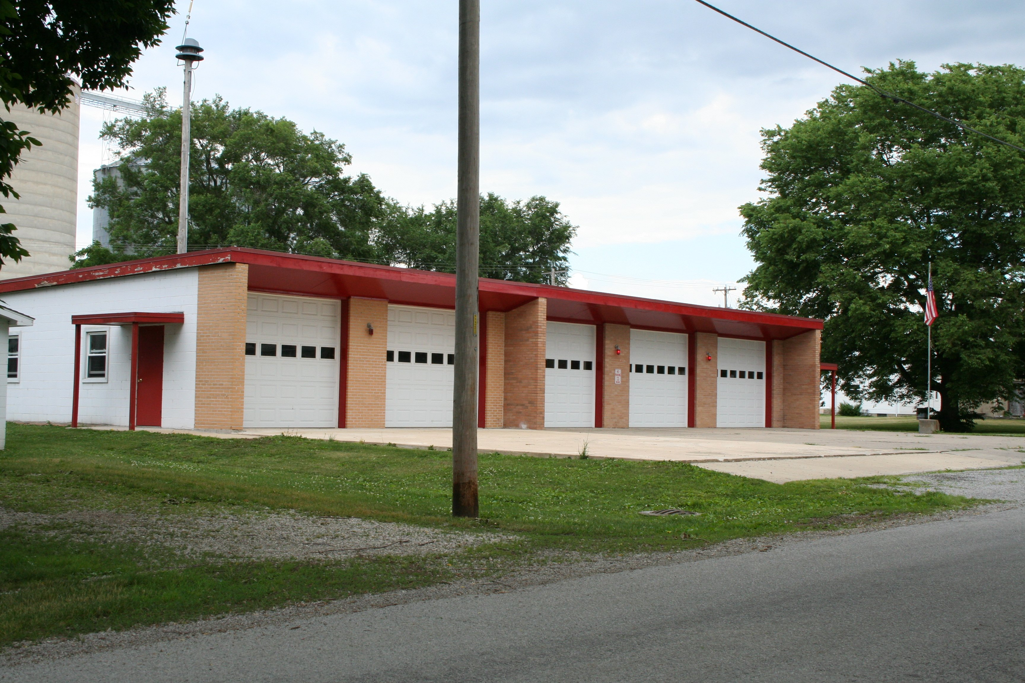 Ivesdale_Illinois_Fire_Station